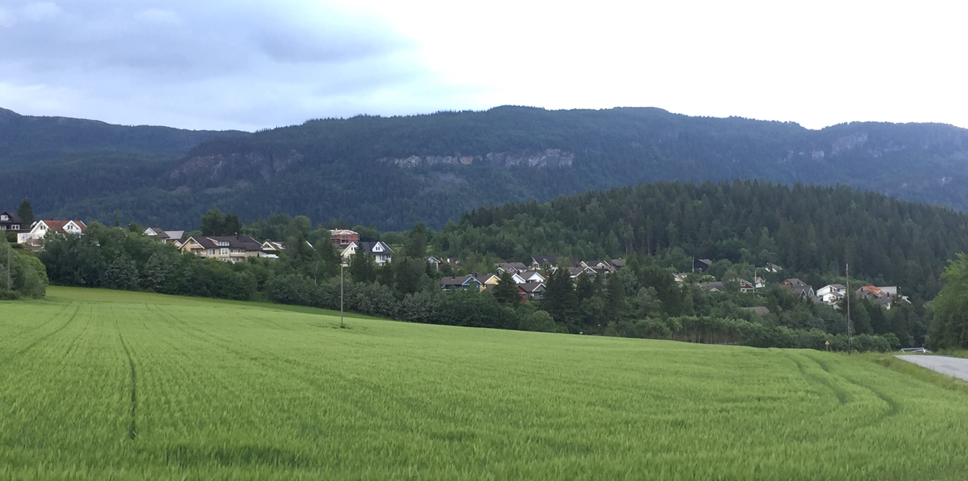 Nordlandsfeltet i Stjørdal, sett østover fra Vifstadlia.